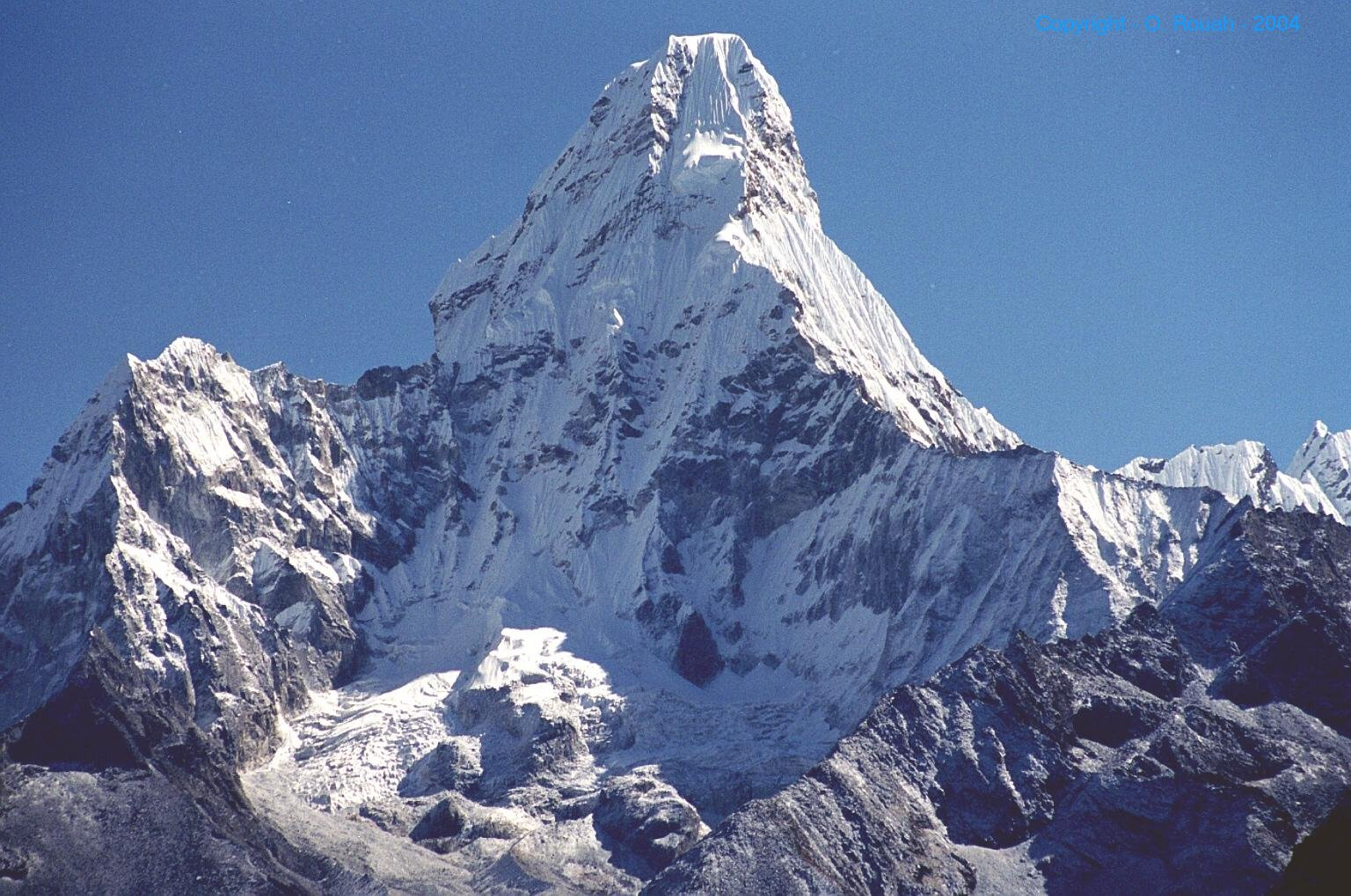 Ama Dablam vue depuis le village de Tengboche dans la vallee du Khumbu Himal (Nepal)